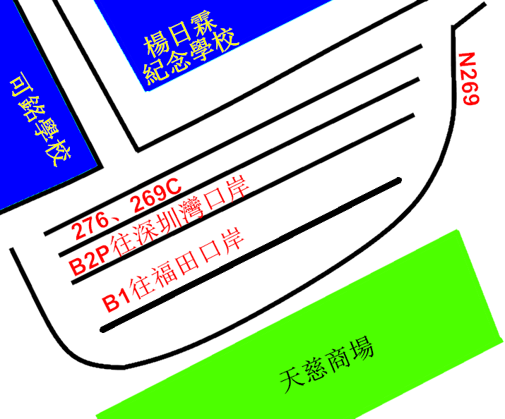 中文（香港）: 天慈巴士銠站的平面圖